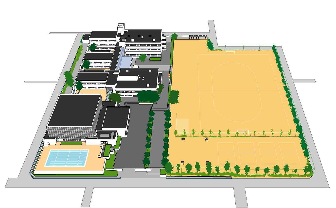 星和中校舎イメージ